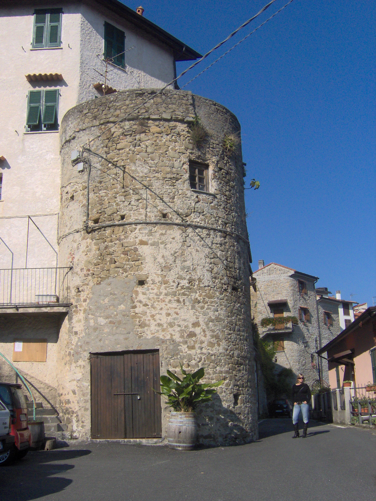 Fortificazione malaspiniana a Follo (SP)